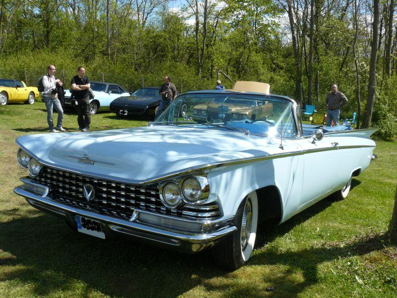 Photo prise à Chelles le 1er Mai 2012